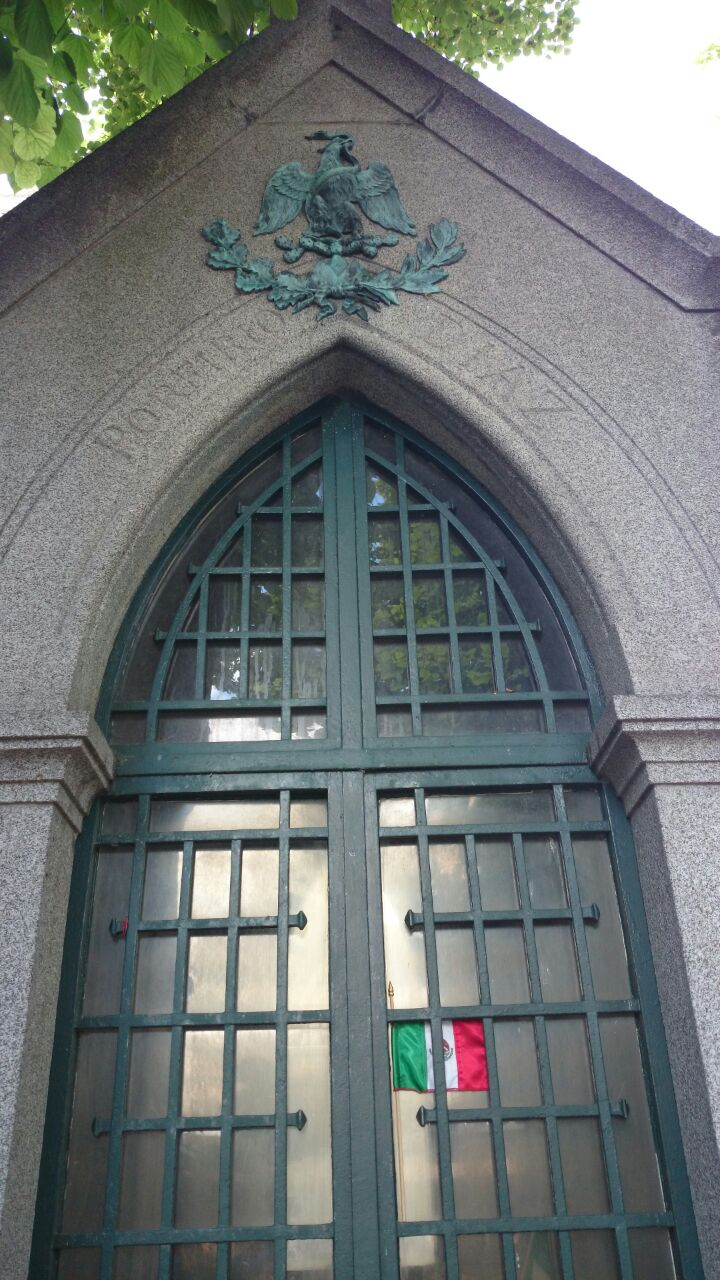 Tumba de Porfirio Díaz en el panteón de Francia. Junio, 2014.